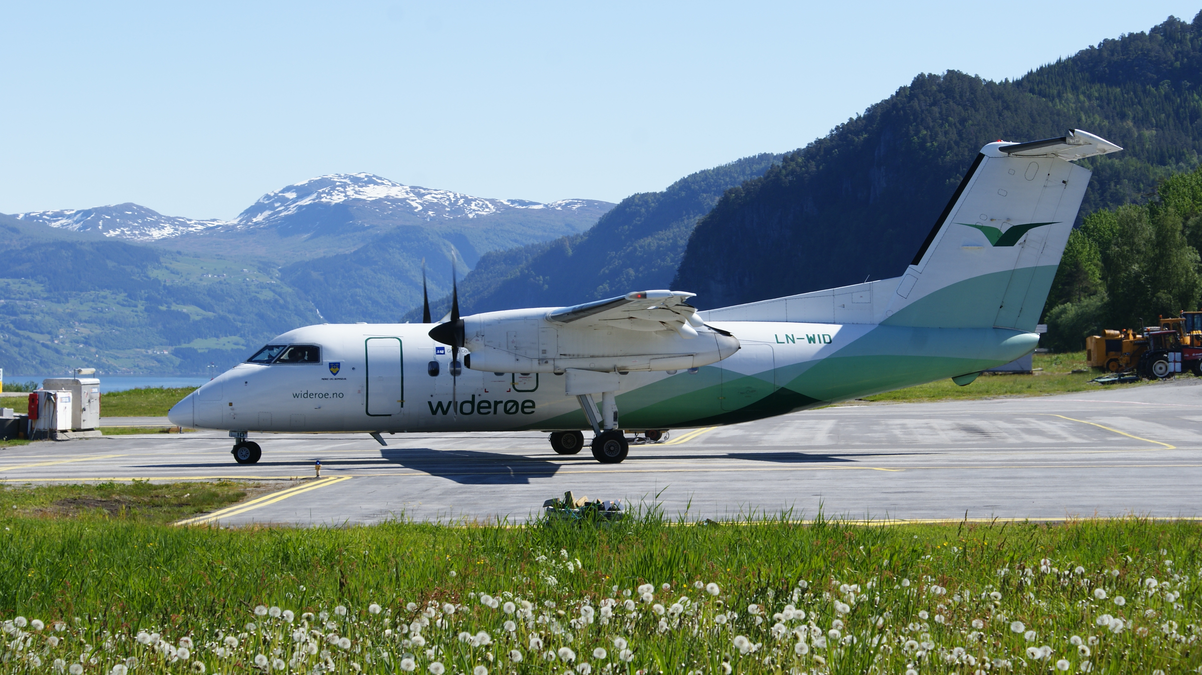 Widerøe de Havilland Canada Dash-8 103 at Sandane Airport, Sogn og Fjordane, Norway.